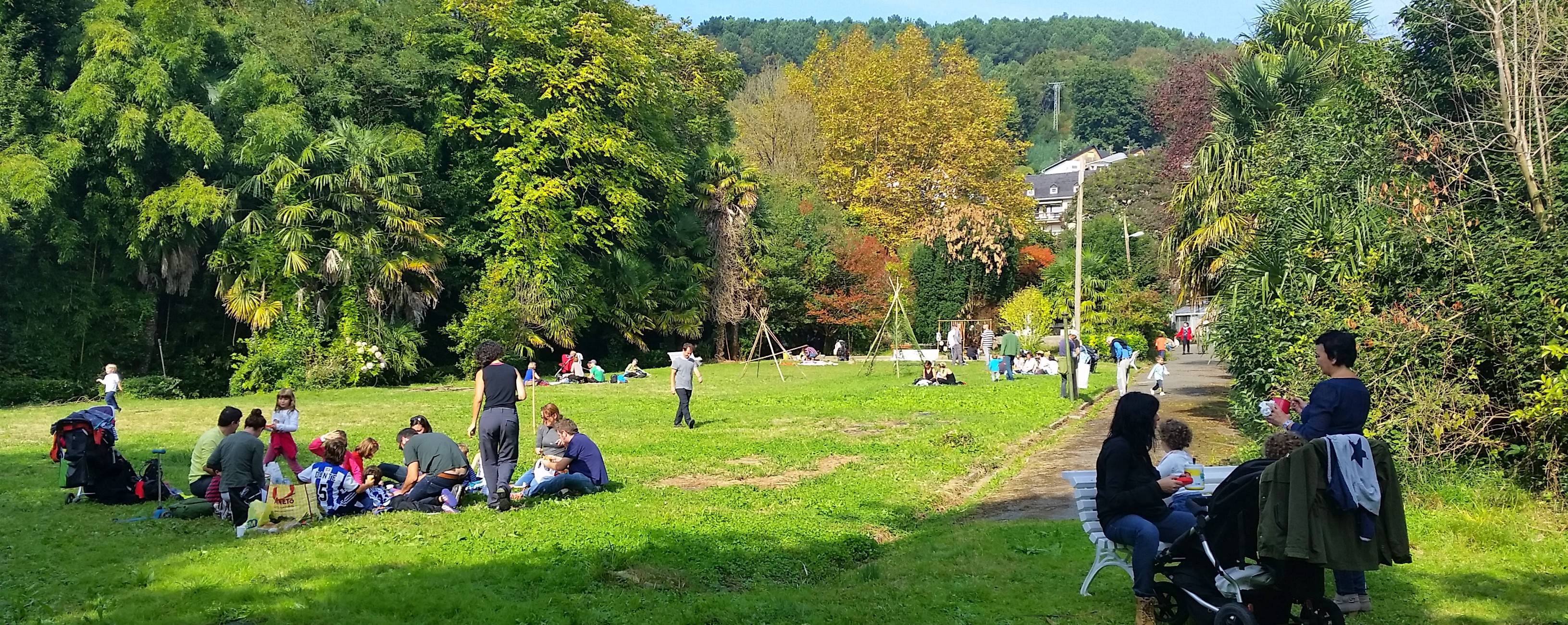 Uliako Lore-Baratzak parkea. Uliako Mintegietako parkea